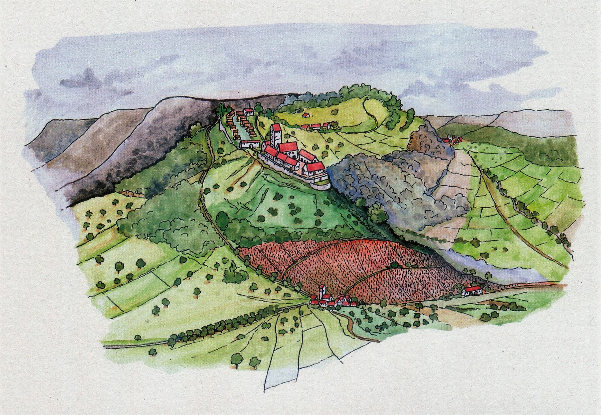 Küssaburg im Landkreis Waldshut in Baden-Württemberg. Historische Darstellung der Burg um 1400. Zeichnung von Wolf Pabst.